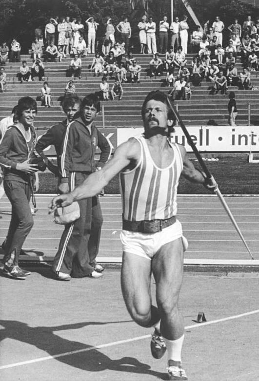 Detlef Michel ADN-ZB Ludwig 30.5.82 Erfurt: Beim traditionellen Pfingstsportfest der Leichtathleten übertraf der Berliner TSC-Speerwerfer Detlef Michel als sicherer Sieger mit 92,50 m gleich im ersten Versuch die 90-m-Grenze. Abgebildete Personen: Michel, Detlef: Leichtathlet, Speerwerfer, DDR